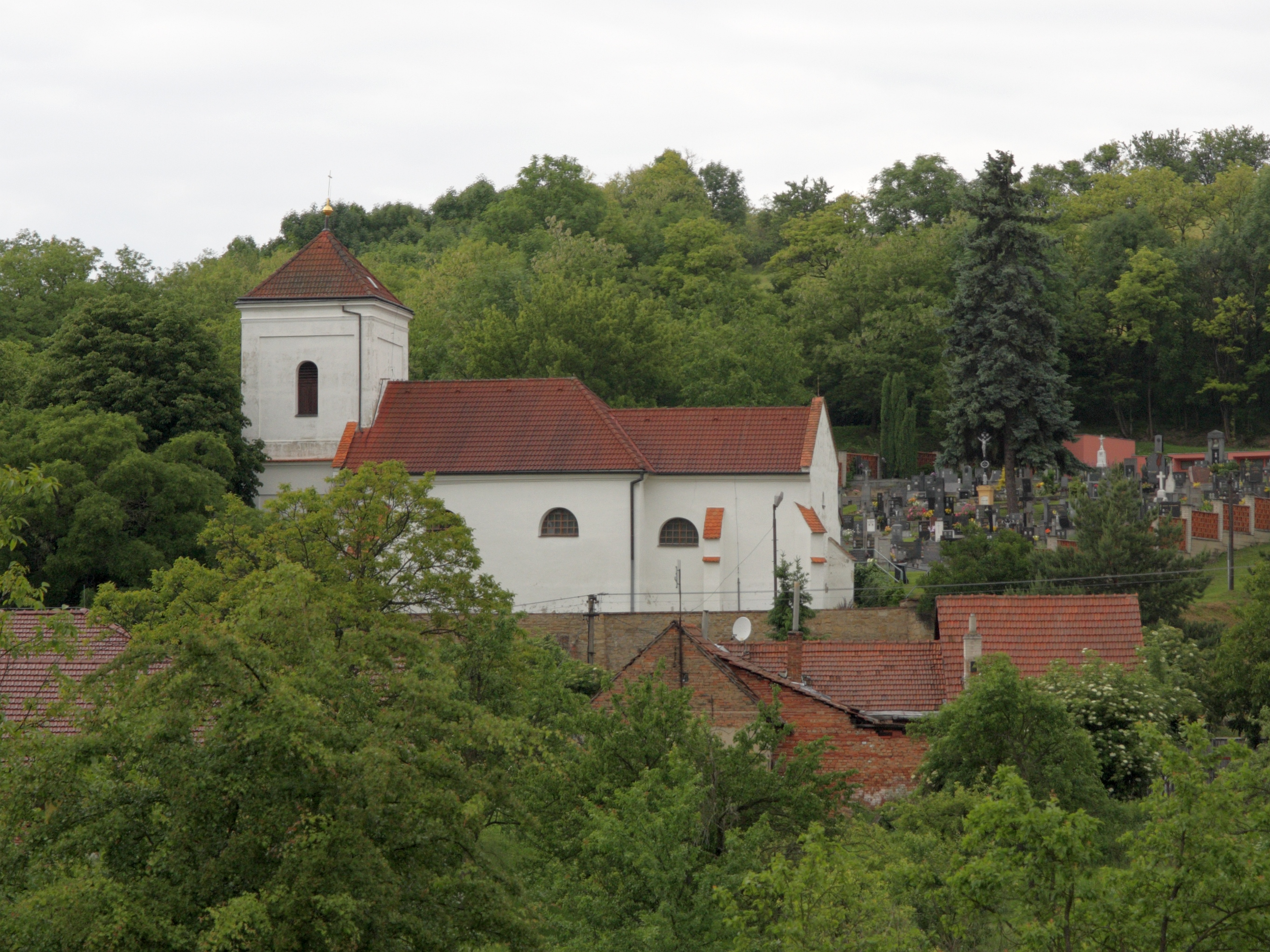 Lovčičky - kostel sv Václava.